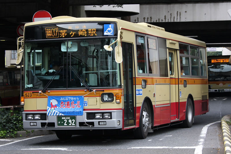 Kanagawa Chuo Kotsu's route bus (Car No.ち23 / Isuzu Erga KL-LV280L1 / FHI 7E body) at Fujisawa Station, Fujisawa, Kanagawa, Japan